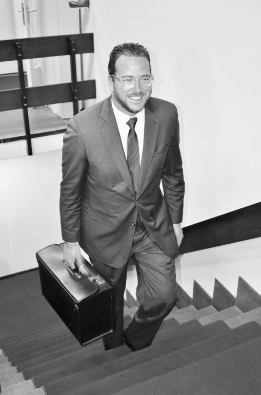 Juan David Yrausquin presenteerd de koffer met daarin de begroting van Land Aruba aan het Parlement (2014)